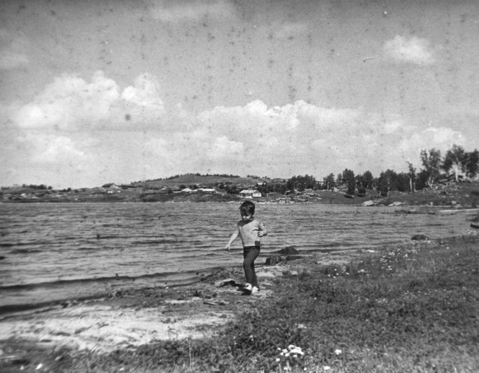 Argazi Reservoir, August 1979